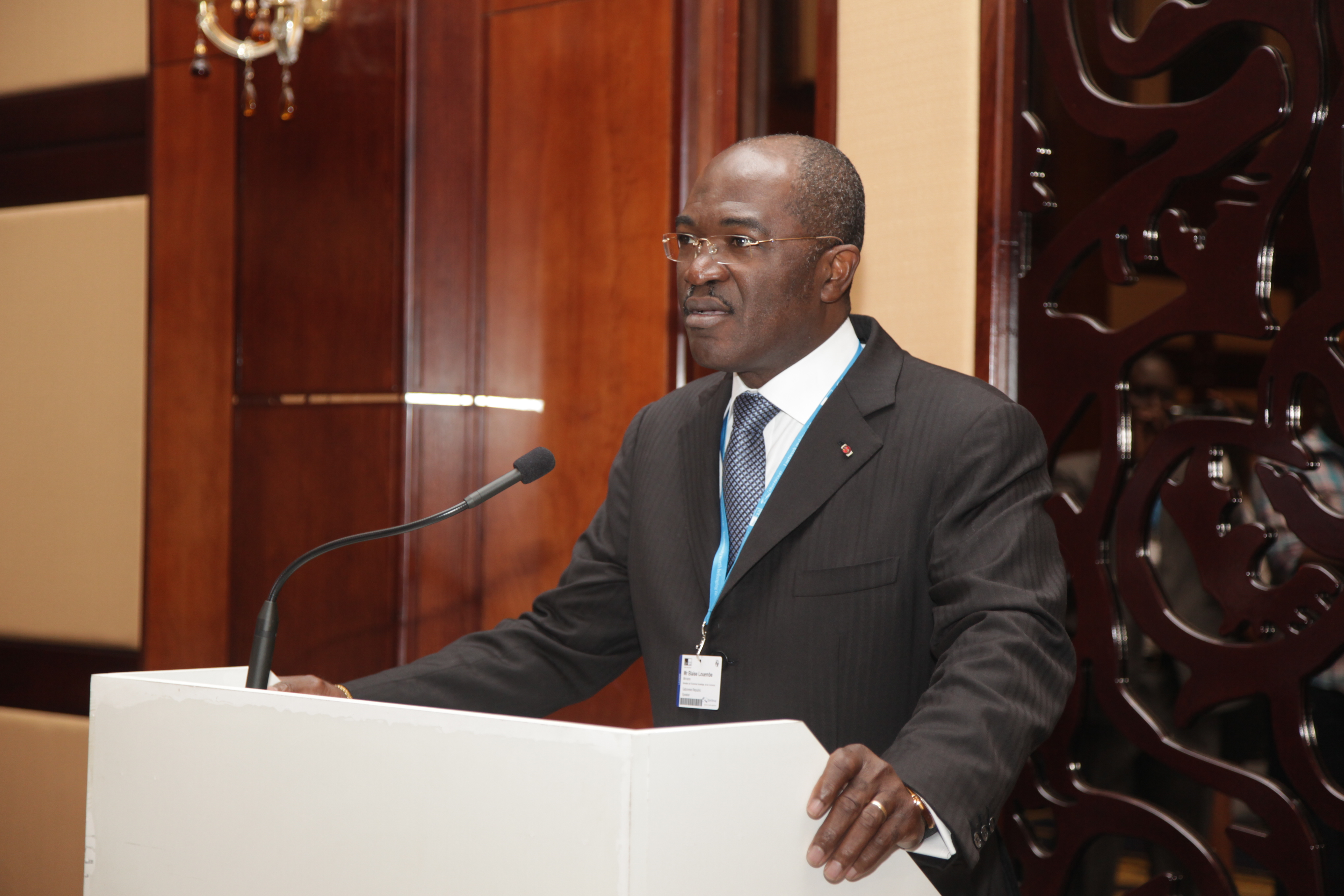 S.E. Mr Blaise Louembe, Ministre, Ministère de l'Economie Numérique, de la Communication et de la Poste, Gabon